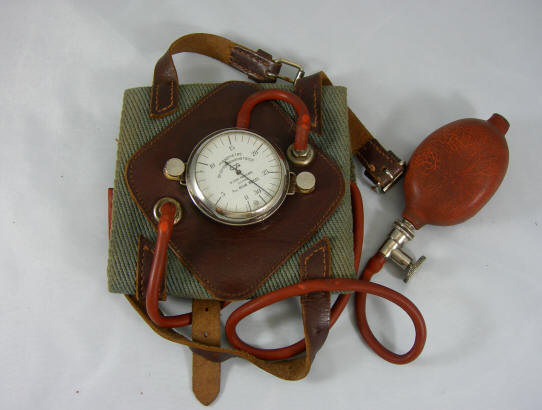 Sfigmomanometro a bracciale del Prof. Riva-Rocci; è uno dei primi strumenti a bracciale dell'inizio 1900. Italia.